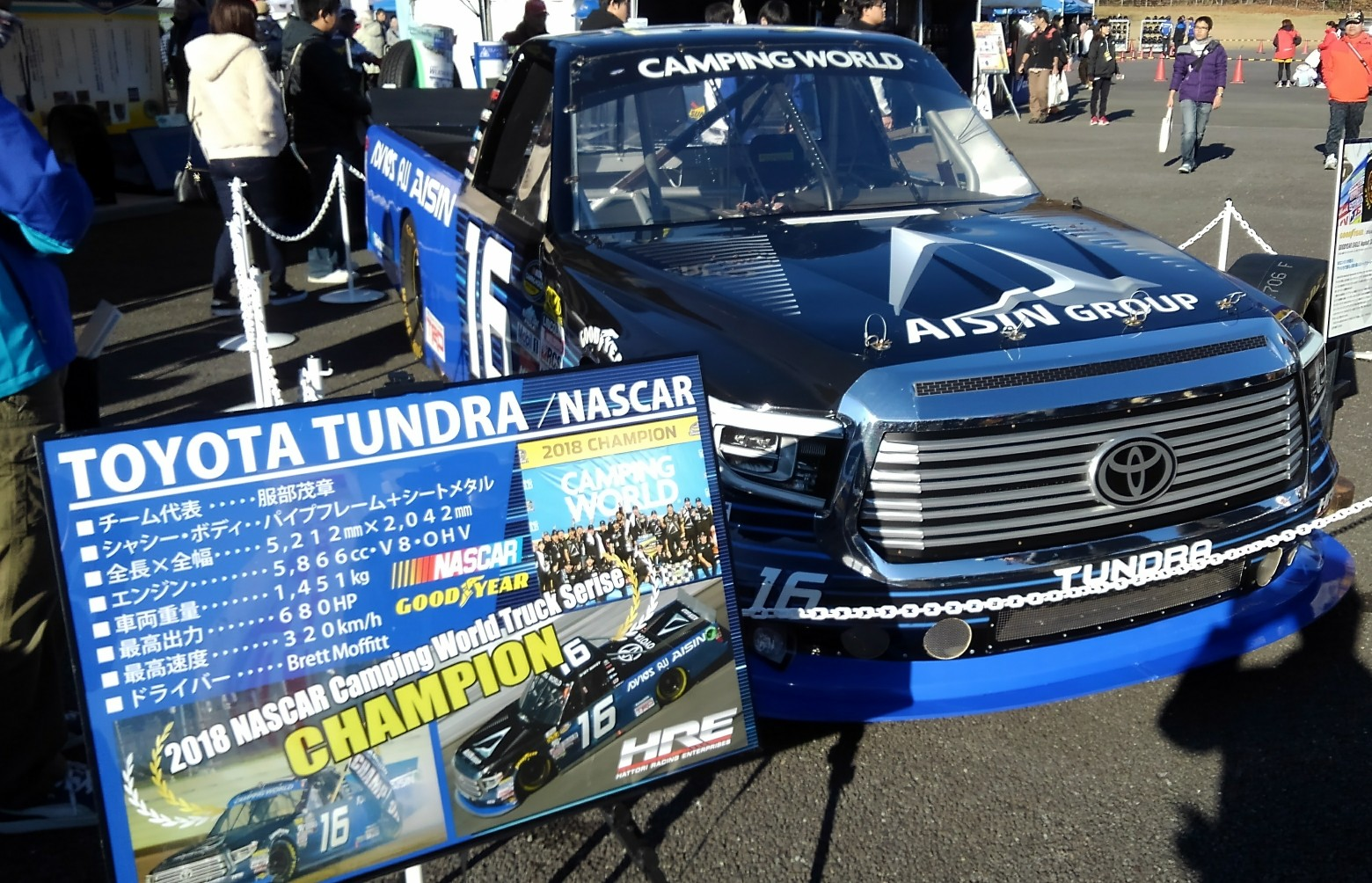 HRE（ハットリ・レーシング・エンタープライズ）のNASCARチャンピオンマシン